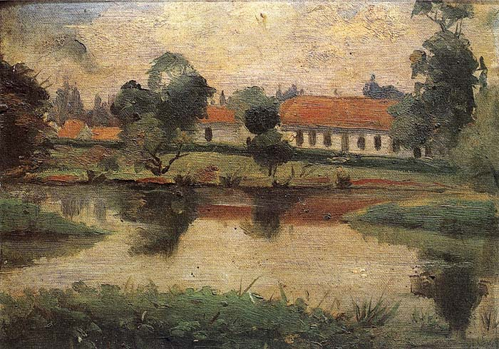 Passeio Público de João Ghelfi (1890-1925) - Óleo sob tela de 24x32 cm Pintado na década de 1910